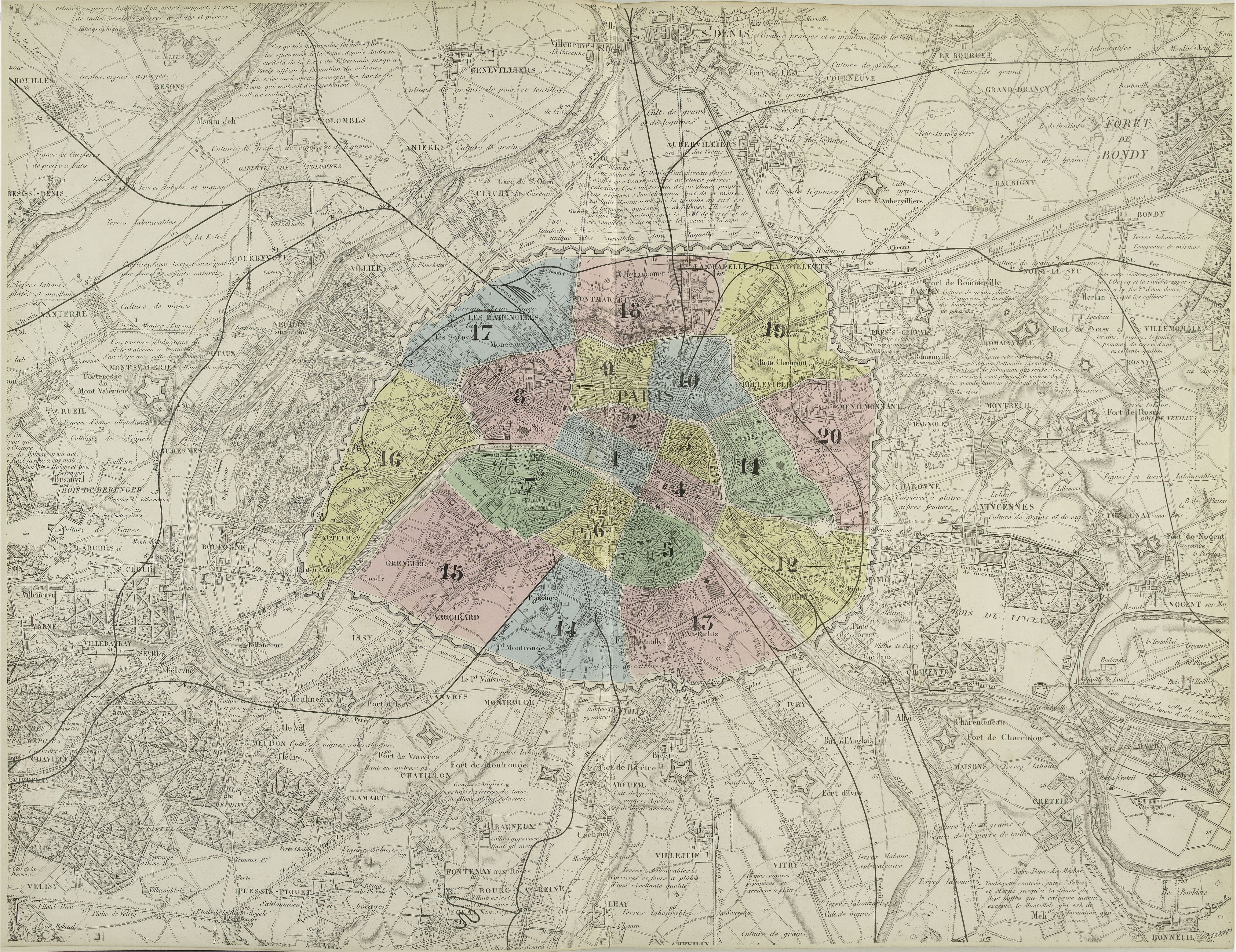 Les arrondissemnts de Paris par Eugène Andriveau-Goujon en 1868.